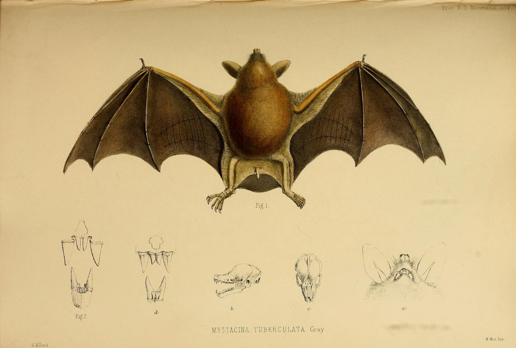 Jp gw$ ' ' w* m id V if S3 O -a! "^